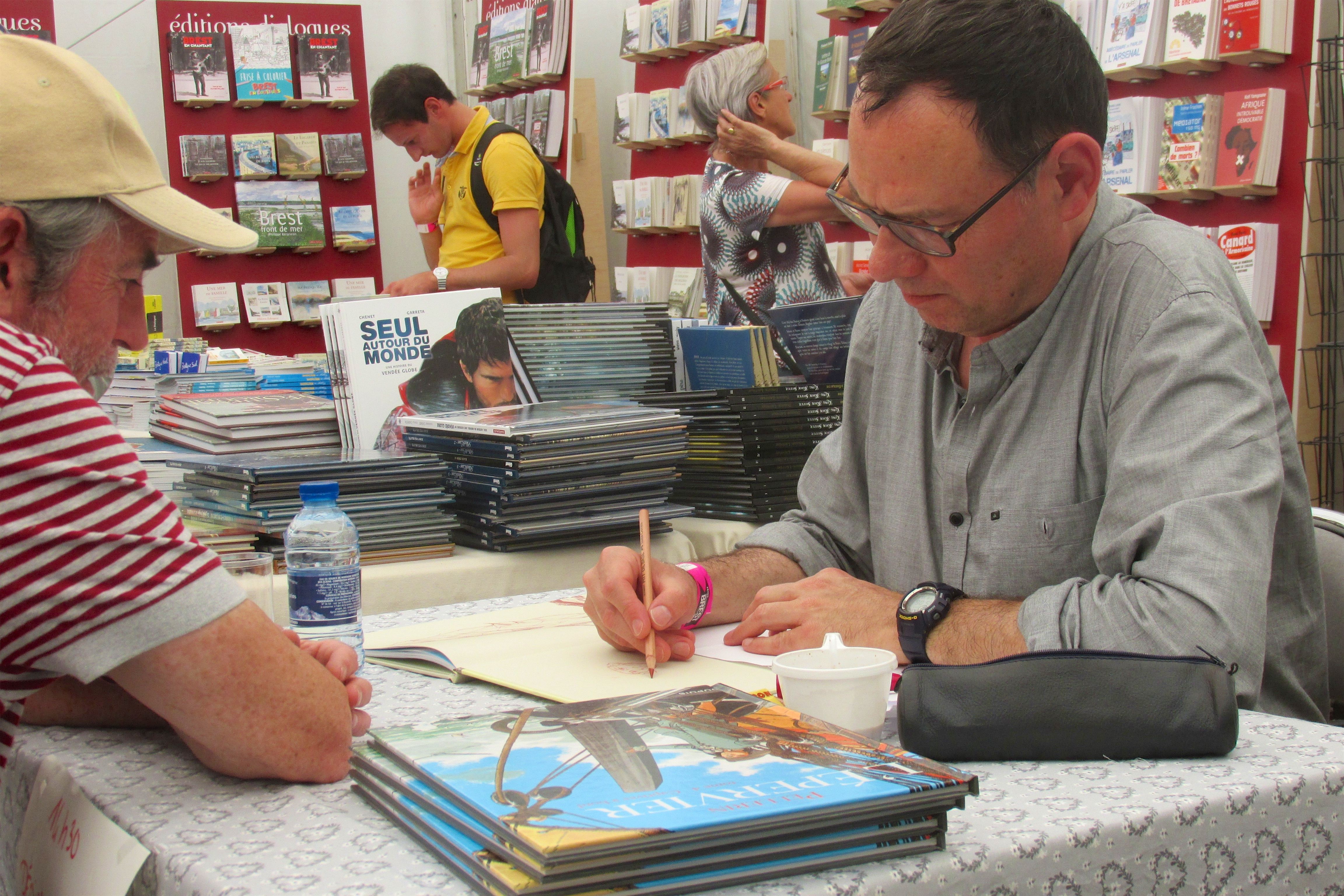 Dédicace de Patrice Pellerin